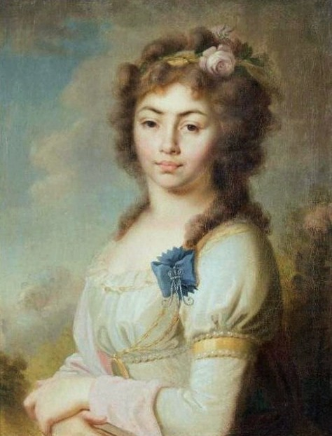 Екатерина Николаевна Арсеньева (1778—1822), изображена с шифром фрейлины императрицы Марии Фёдоровны. В каталогах музея числится как портрет фрейлины императрицы Марии Федоровны. В книге «Русская портретная галерея. Собрание портретов замечательных русских людей». Репринтное издание, 1887, аналогичный портрет значится изображением Е. Н. Арсеньевой.